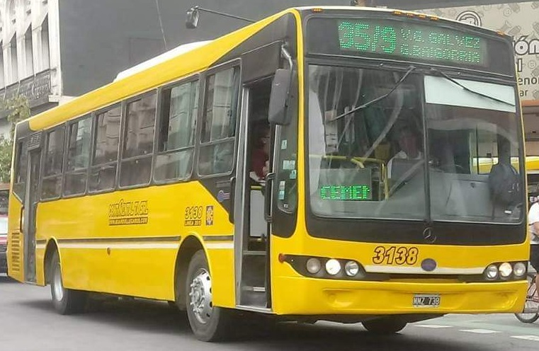 Mercedes-Benz O 500 carrozado por Nuovobus, de la actual 35/9 Verde. Esta denominación se dio en reemplazo de la original.